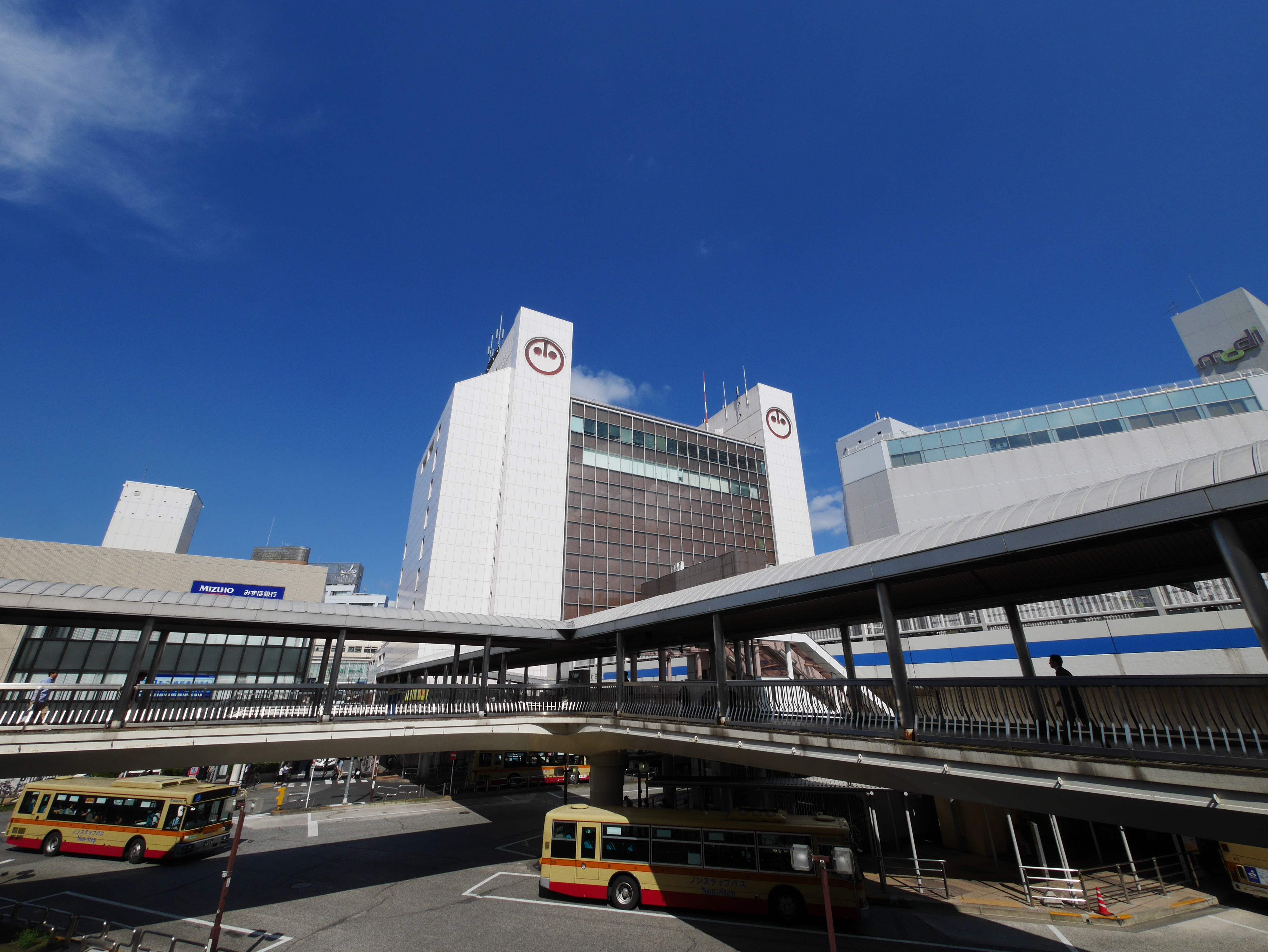 小田急百貨店・町田店